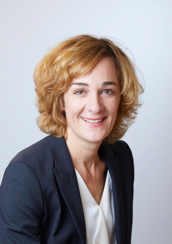 Ursula Wyss, Direktorin für Tiefbau, Verkehr und Stadtgrün (TVS)